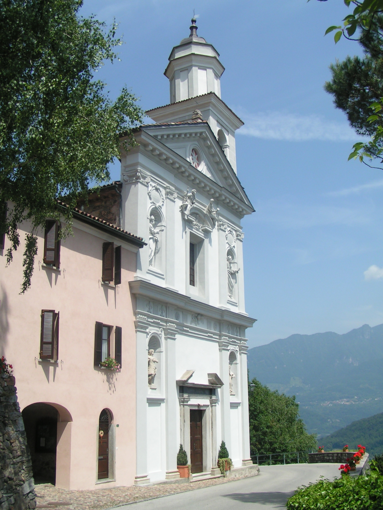 Foto della Chiesa dei Santi Fedele e Simone, a Vico Morcote